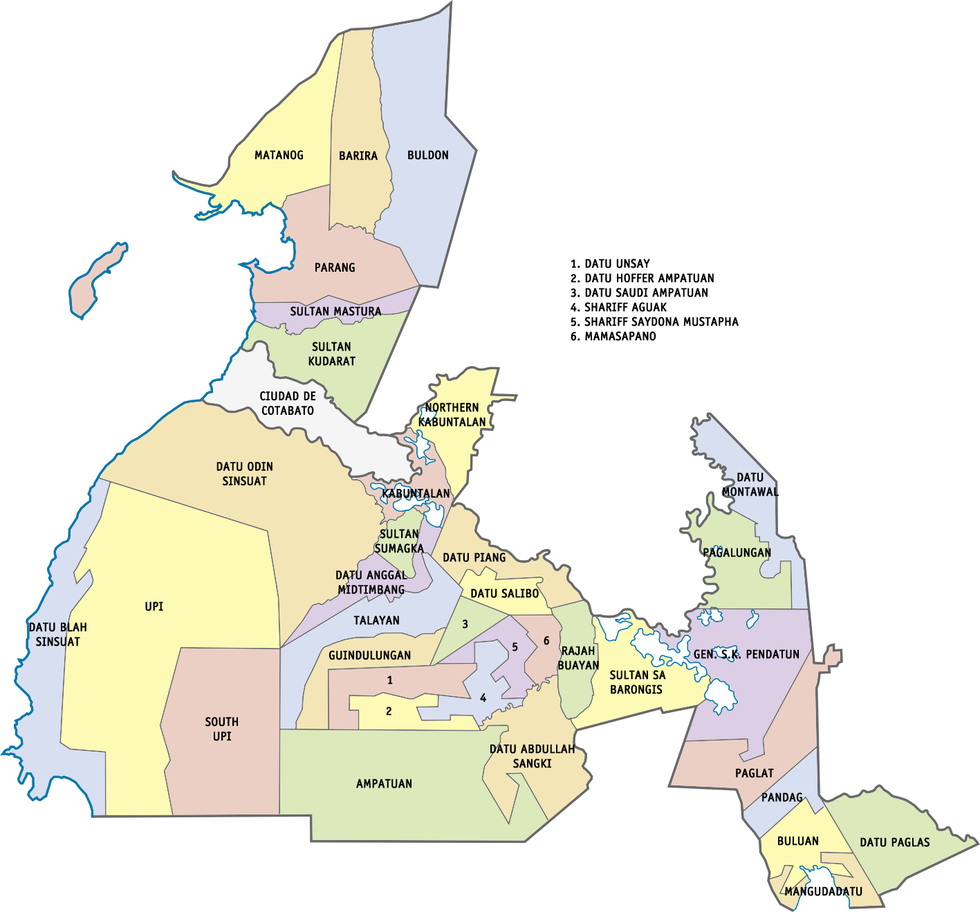 Mapa political de provincia de Maguindanao